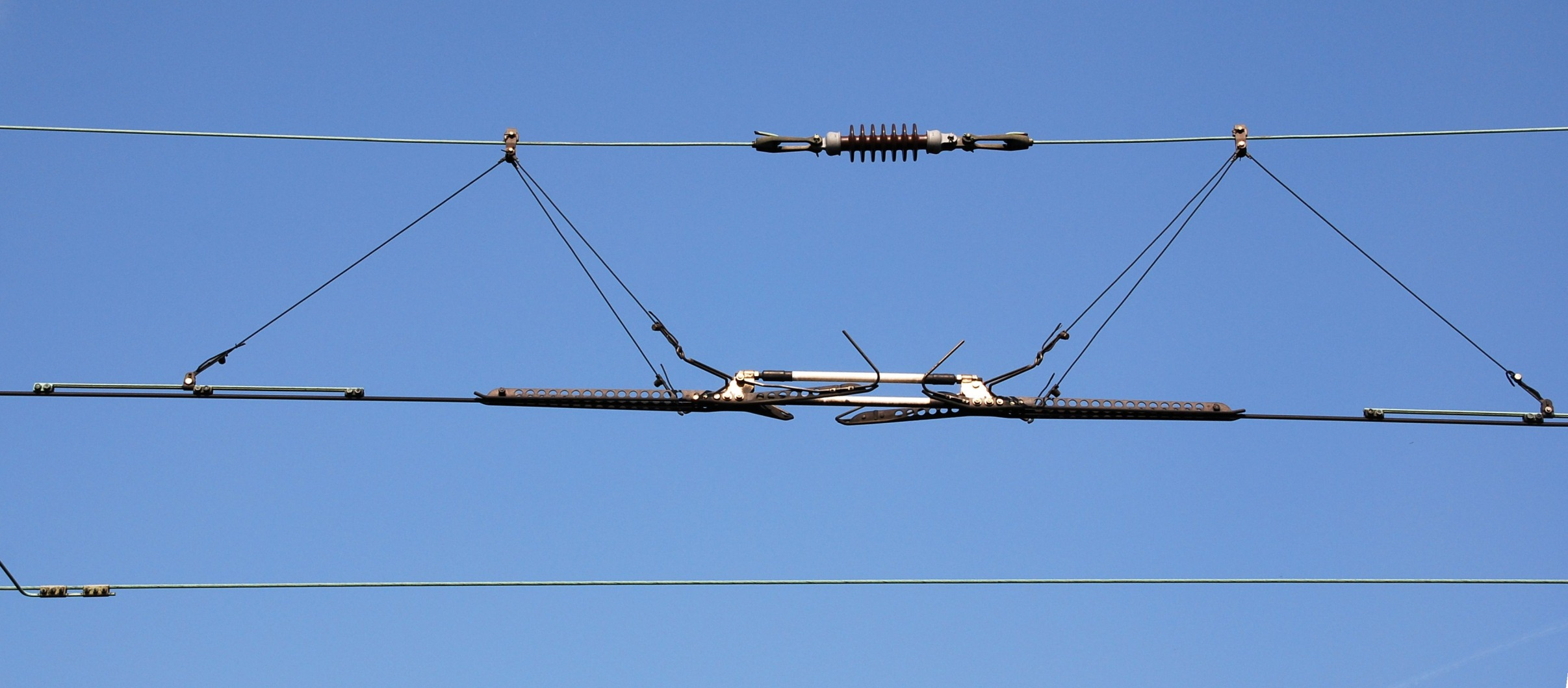 Phasentrennstelle an der Basler Verbindungsbrücke.